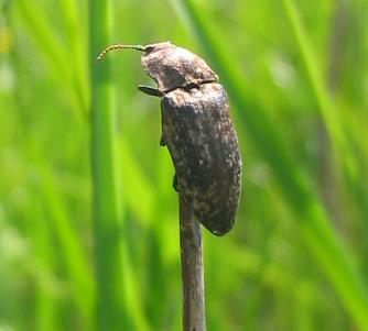 Kniptor (Agrypnus) Eigen foto B kimmel